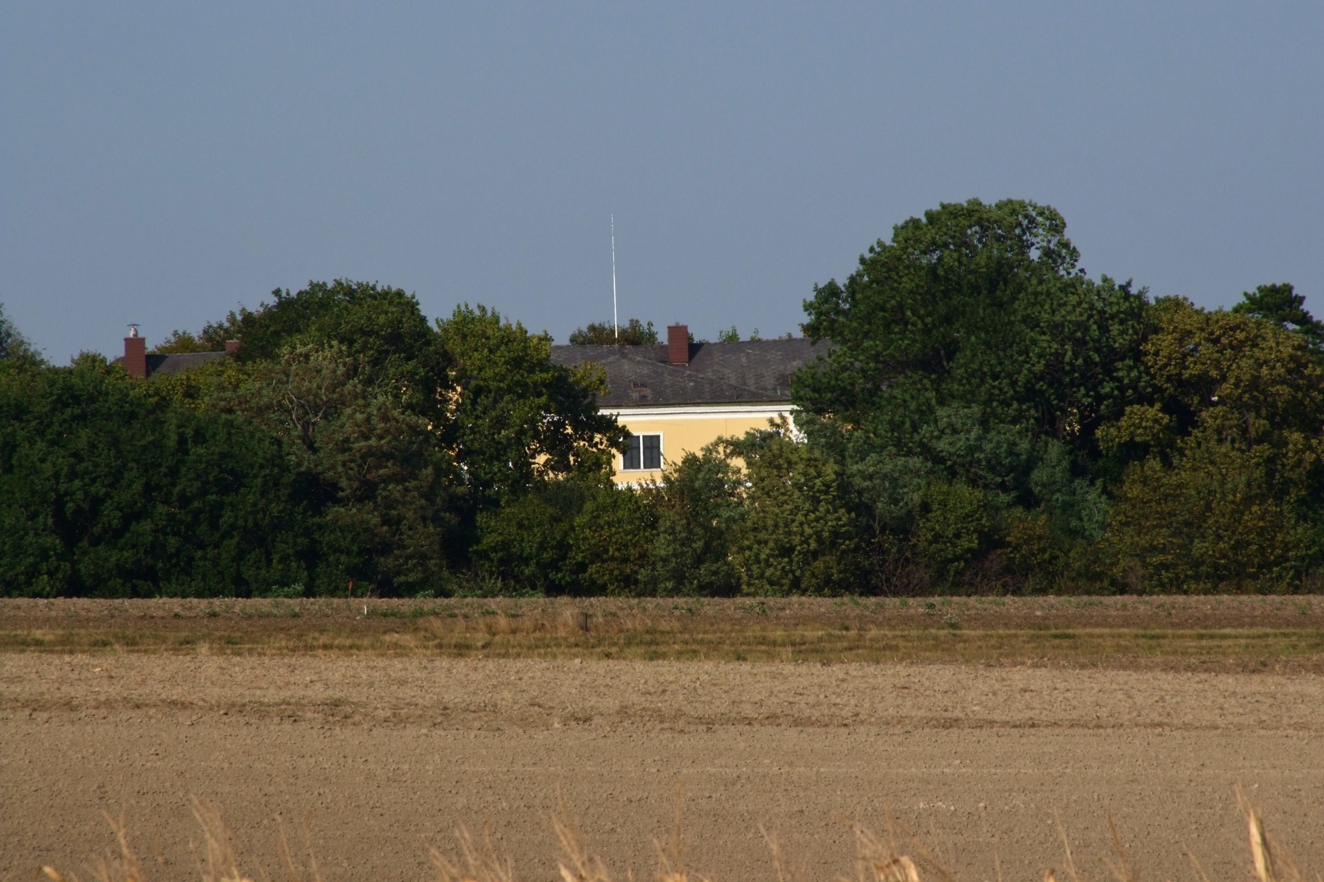 Schloss Schönkirchen